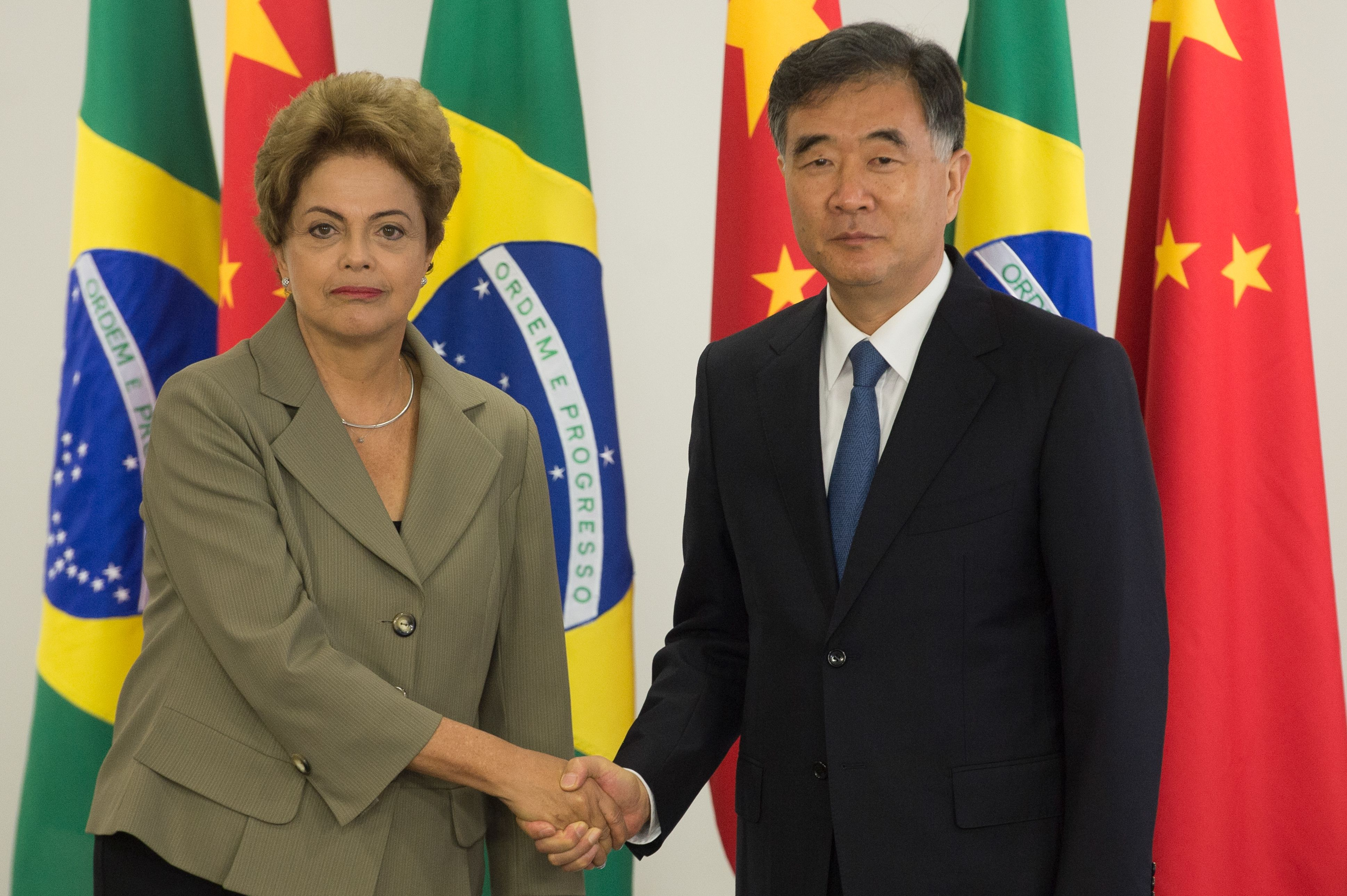 A presidenta Dilma Rousseff recebe o vice-primeiro-ministro da República Popular da China, Wang Yang.